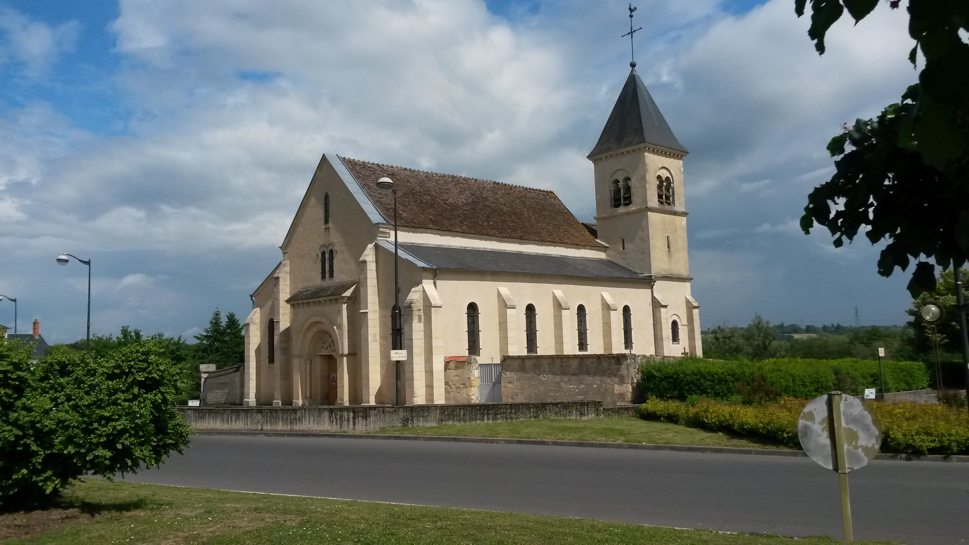 Coulanges-les-Nevers (église Saint-Théodore)